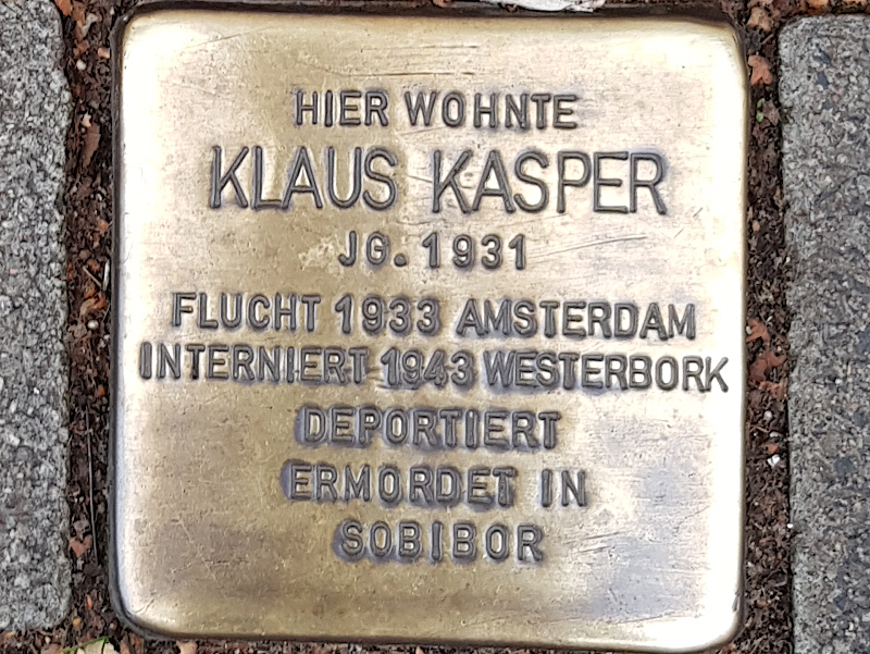 Stolperstein für Klaus Kasper, Sternbuschweg 14, Duisburg-Neudorf, Jg. 1931, Flucht 1933 nach Amsterdam, interniert 1943 in Westerbork, deportiert, ermordet 1943 im Vernichtungslager Sobibor